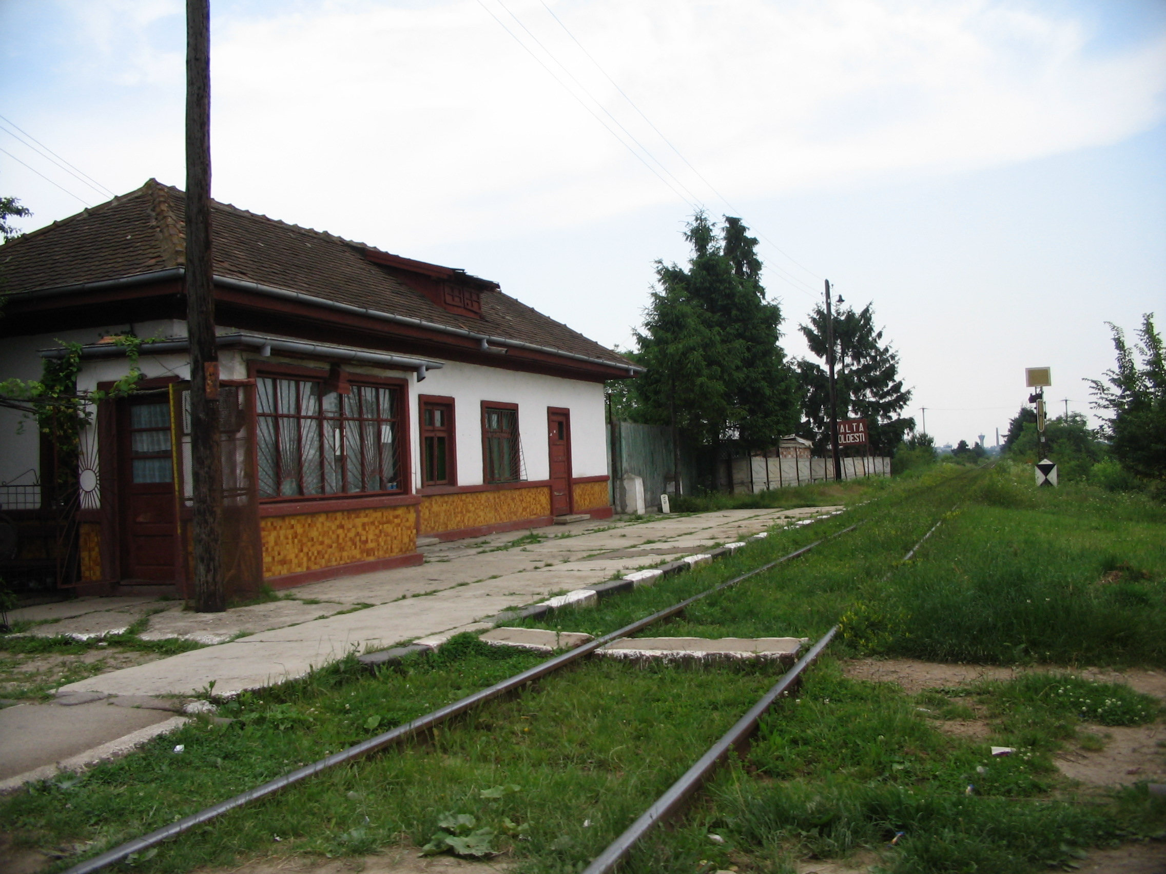 The Boldeşti train station, Boldeşti-Scăeni, Romania